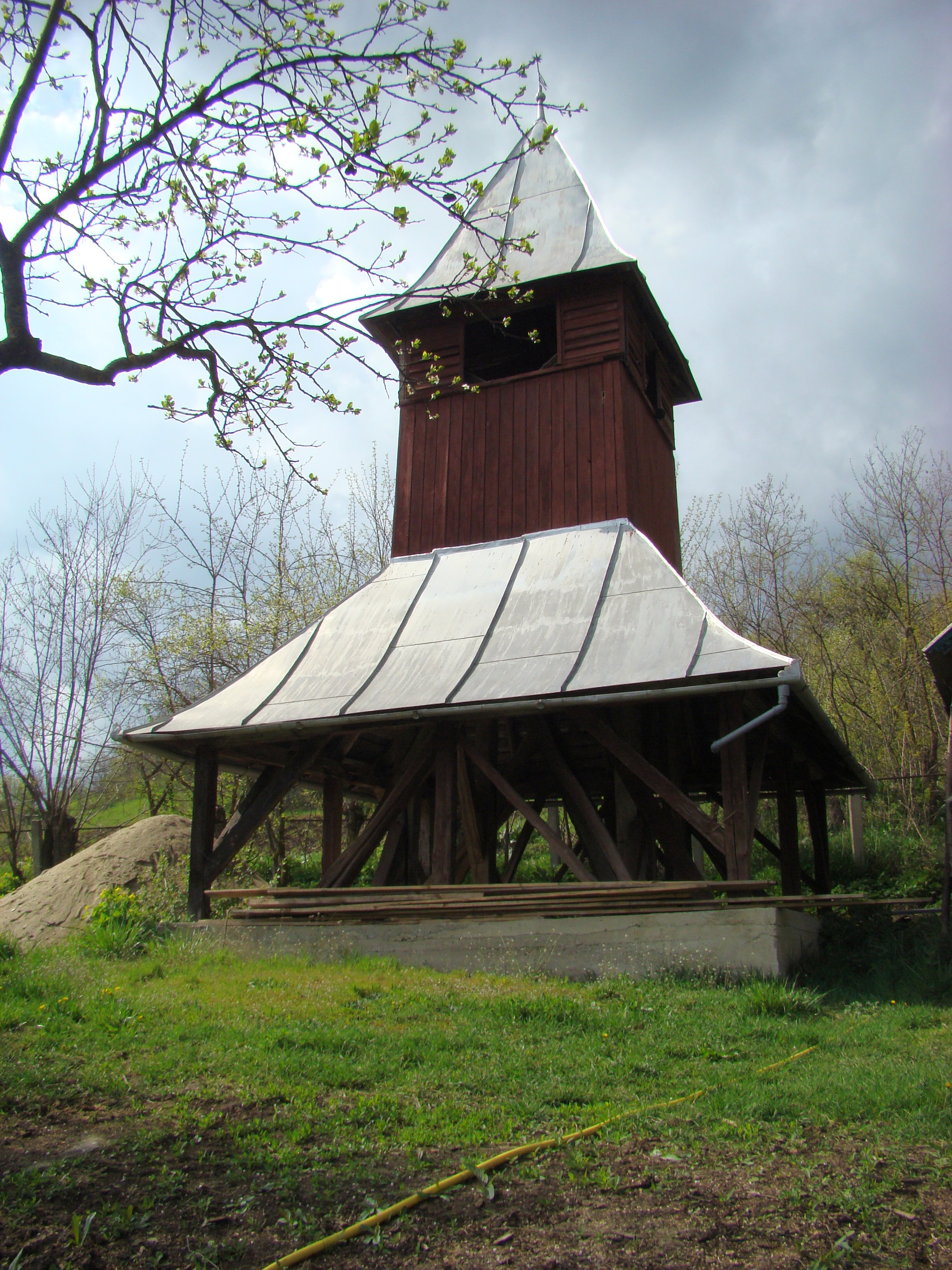 Clopotnița bisericii reformate, sat Chesău; comuna Mociu, județul Cluj 02